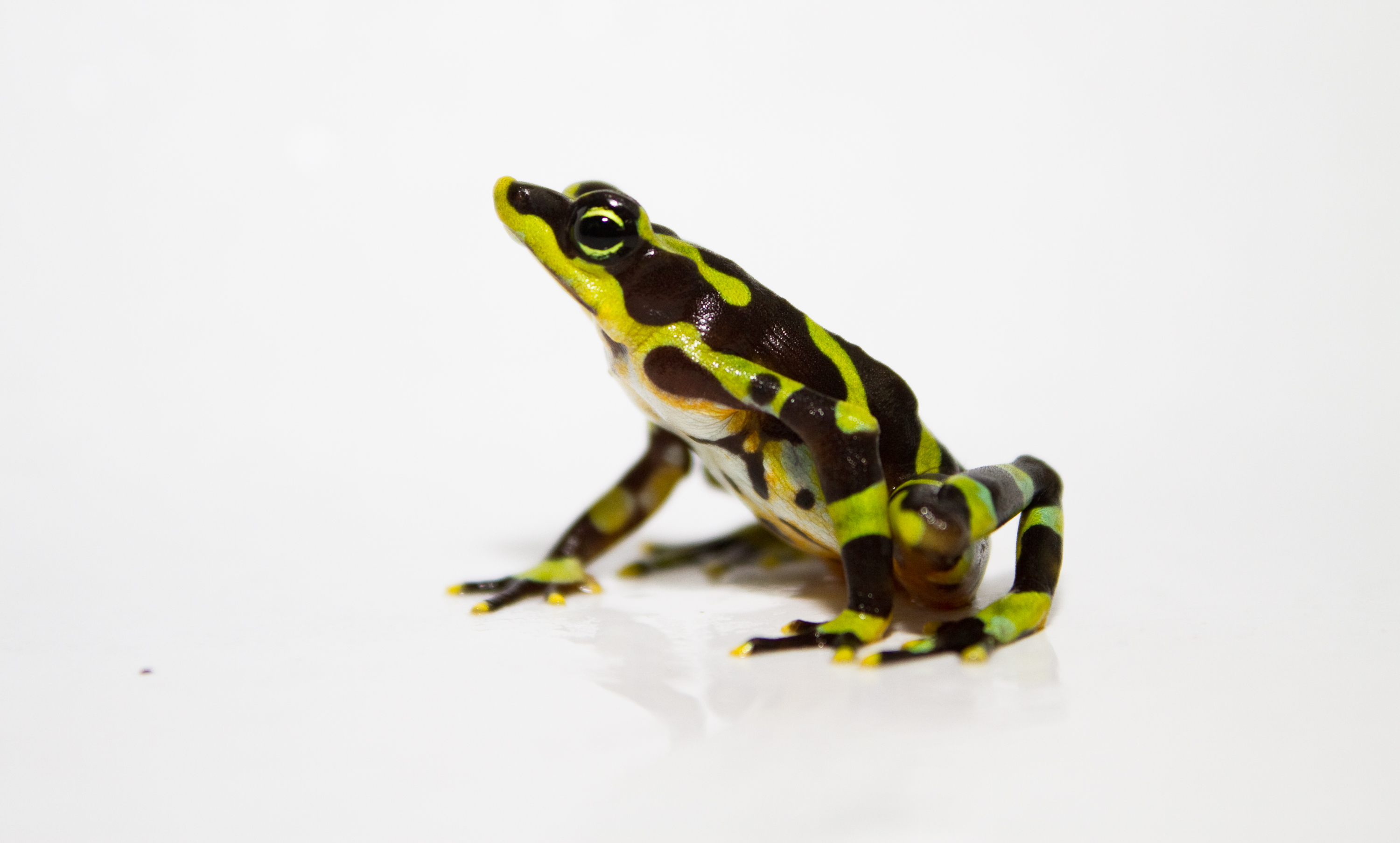 Atelopus limosus, male, from Panama.